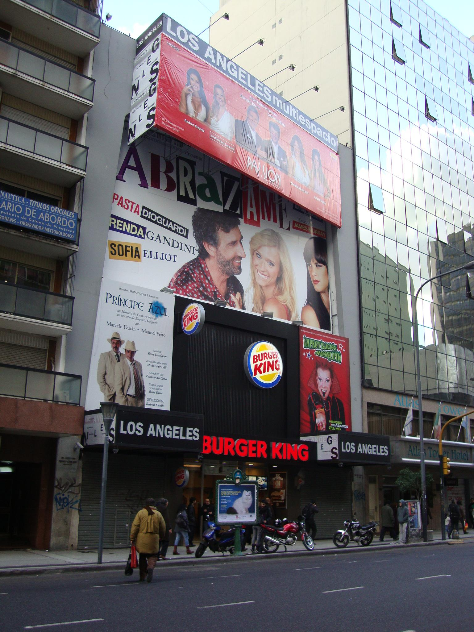 El Multiespacio Los Ángeles (antes Cine Los Ángeles), clausurado luego de marzo de 2010. Avenida Corrientes 1764, Buenos Aires.